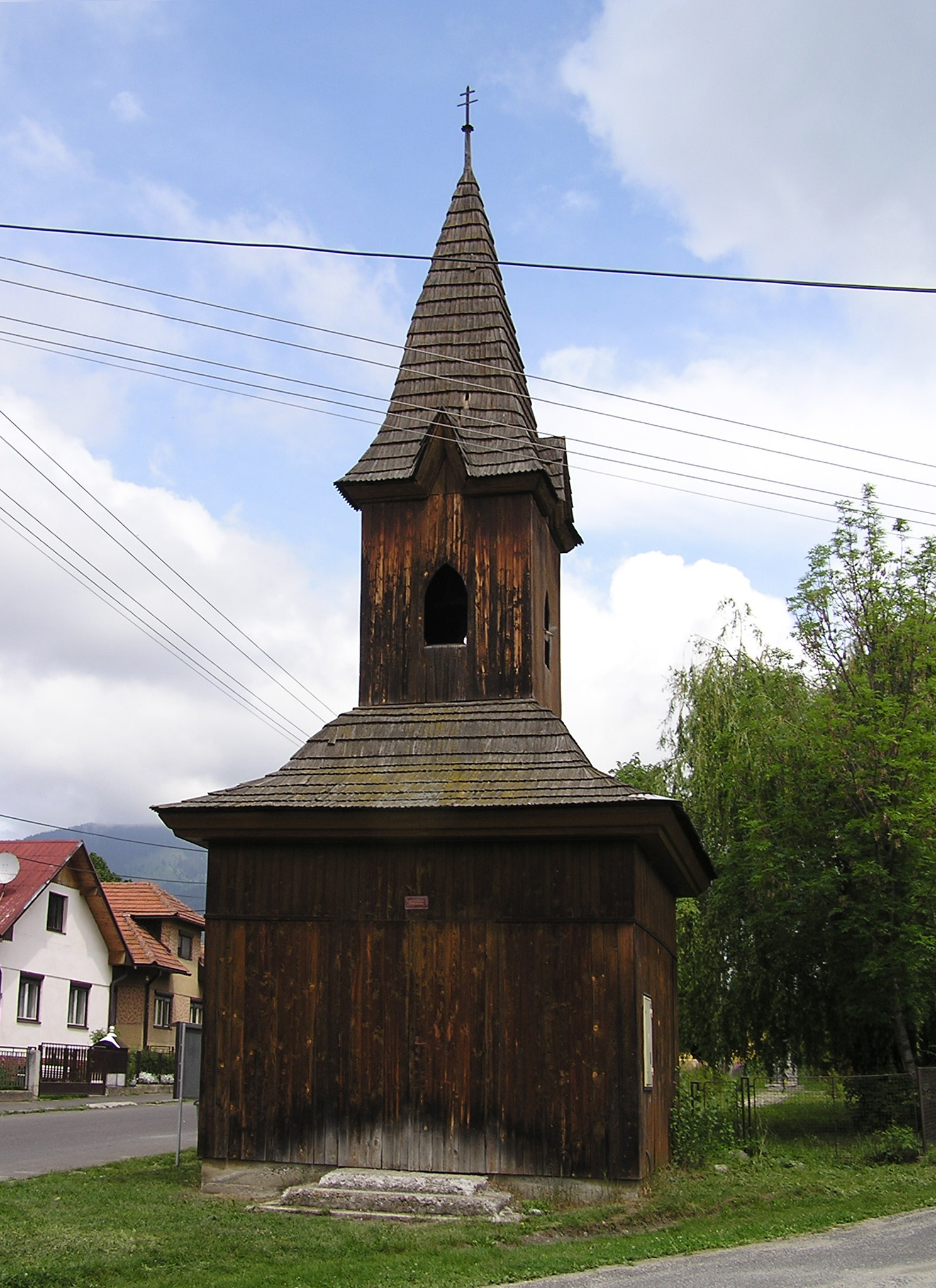 Zvonica drevená, Jalovec.